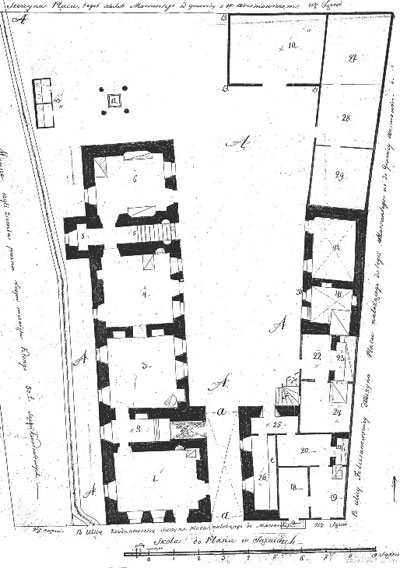 Беларуская (тарашкевіца): Менск (Miensk), рог вуліц Койданаўскай (vulica Kojdanaŭskaja) і Фэліцыянаўскай (vulica Felicyjanaŭskaja). 1-ы паверх камяніцы